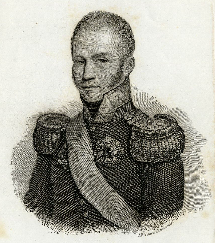 Portret van Godert Alexander Gerard Philip baron van der Capellen van Berkenwoude, geboren Utrecht 15 december 1778, president-curator van de Utrechtse hogeschool, raad van financiën in het departement Utrecht (1805), secretaris-generaal van het departement Utrecht (1806-1808), later minister van staat en gouverneur-generaal van Nederlands Indië, overleden De Bilt 10 april 1848. Borstbeeld links, in uniform.Prentje (staalgravure) van J.B. Tetar van Elven uit ca. 1829, afkomstig uit een onbekende publicatie. Ook afgebeeld in de Utrechtsche Volksalmank van 1841. Dit prentje is afkomstig uit de door de kunstenaar Anthony Grolman samengestelde Atlas Grolman.